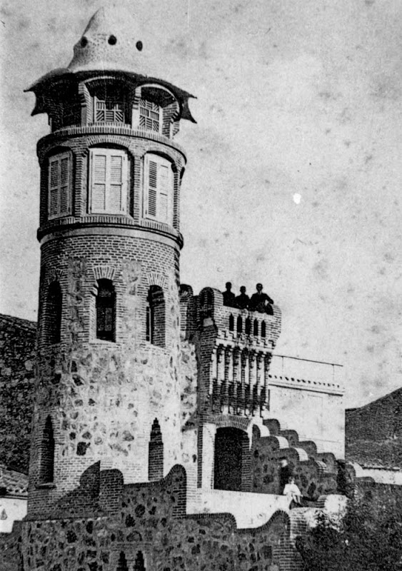 La Torre Mateu, conocida como "La Miranda", construida en Llinars del Vallès, Barcelona aproximadamente en 1906 y demolida en 1962. La foto es de la época de su construcción, de autor desconocido.